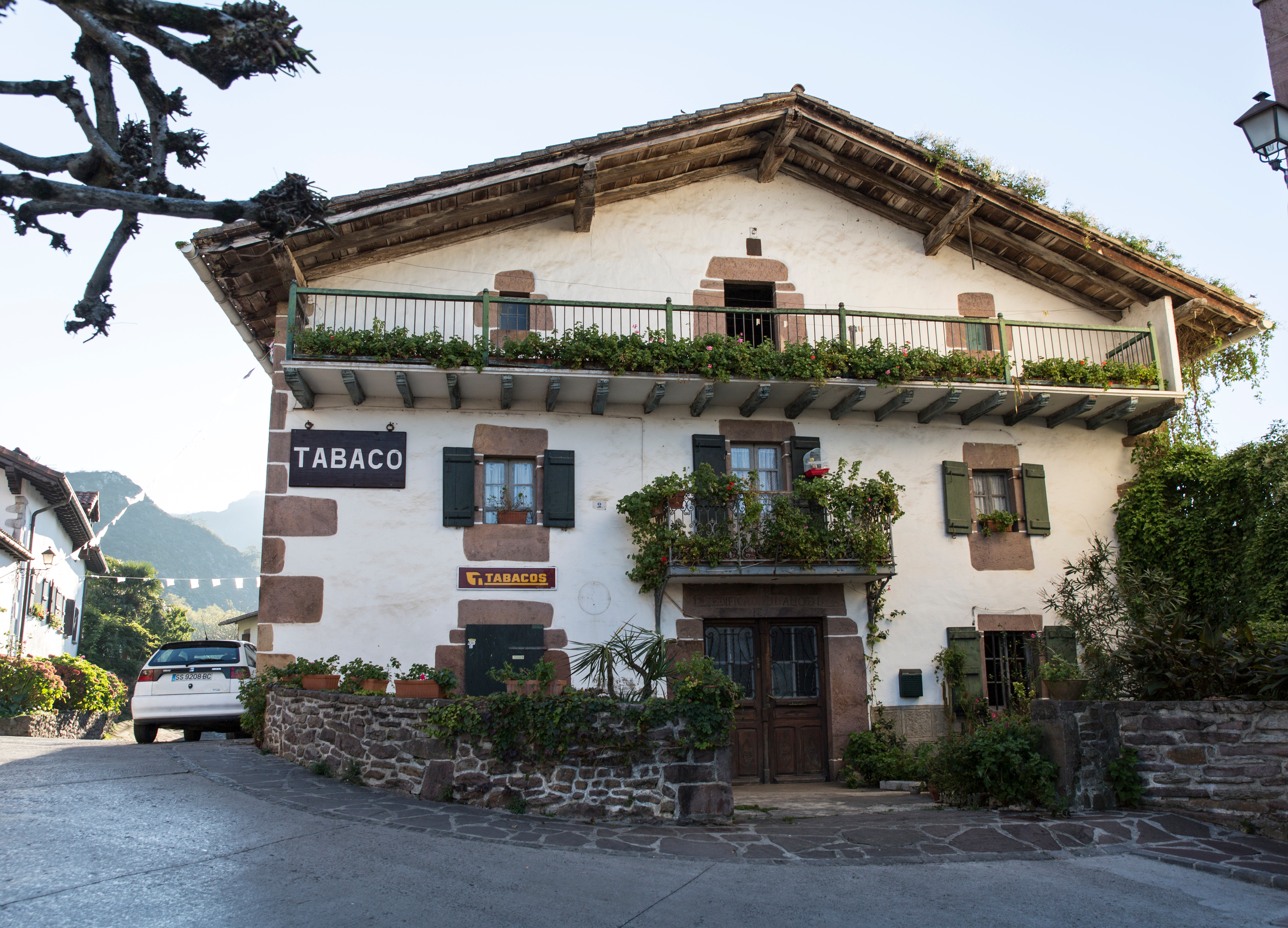 Bureau de tabac